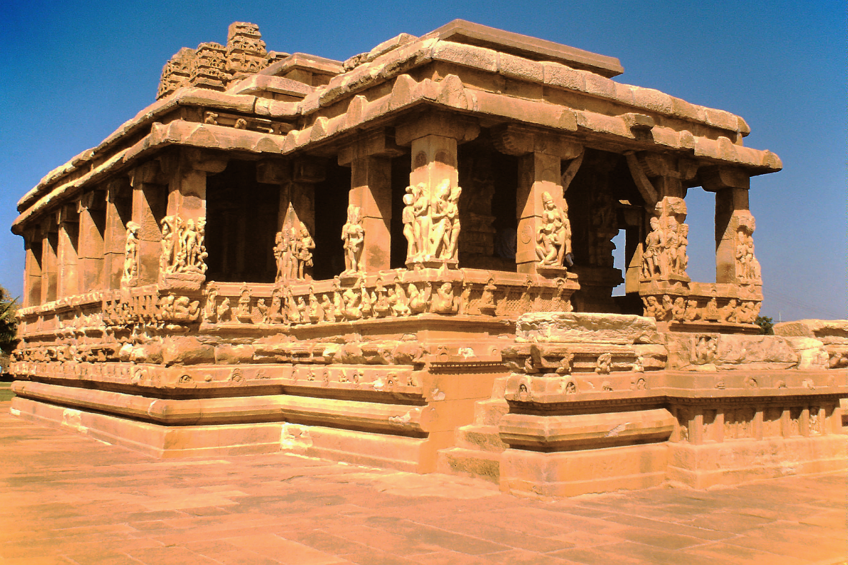 Aihole, Durga-Tempel (Front)